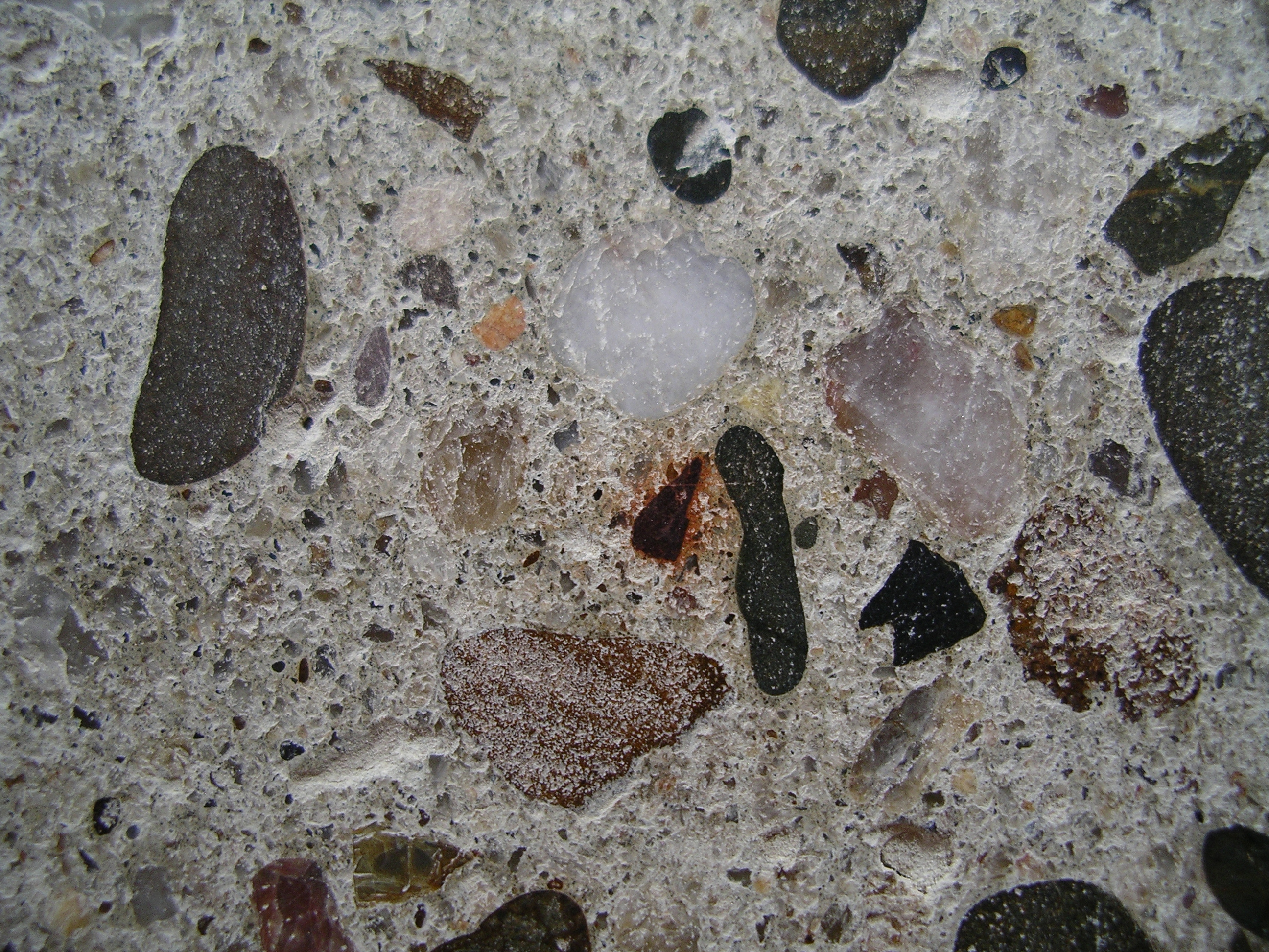 ältere Betonbodenplatte mit Diamant-Fräse abgeschliffen und mit Kunststoff versiegelt: Nahaufnahme. Man erkennt die ungünstige Kornverteilung, das innere der angeschliffenen groben Gesteinskörnungen sowie einzelne Sandkörner.